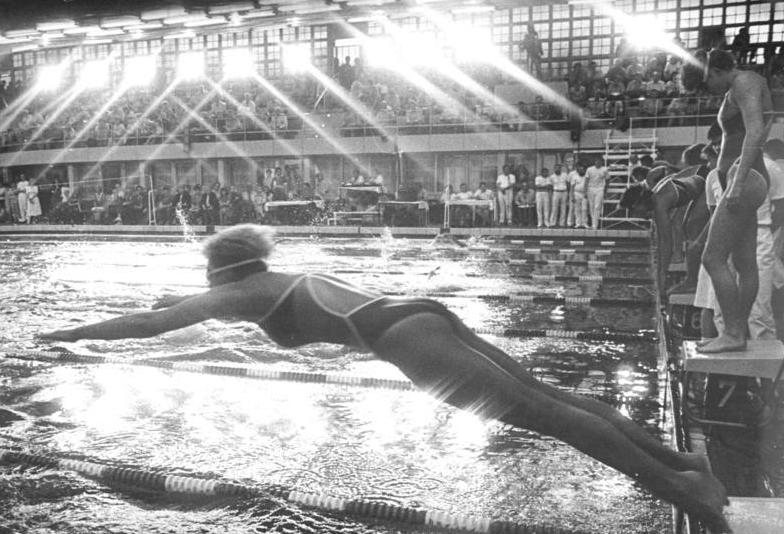 Erfurt, 38. DDR-Meisterschaften im Sportschwimmen, Freistil ADN-ZB Kapser-17.6.87 Erfurt: 38. DDR-Meisterschaften im Sportschwimmen- Stimmungsvolle Atmosphäre währen des Staffel-Wettbewerbs über 4x 200 m Freistil der Damen am Eröffnungstag (16.6.87) der diesjährigen Titelkämpfe. Erfurt ist nach 1949 nun zum dritten Mal Austragungsort der Meisterschaften im Sportschwimmen. In der Erfurter Schwimmhalle Süd gehen 280 Aktive an den Start. Dabei ist die komplette DDR-Spitze mit allen Weltmeistern.